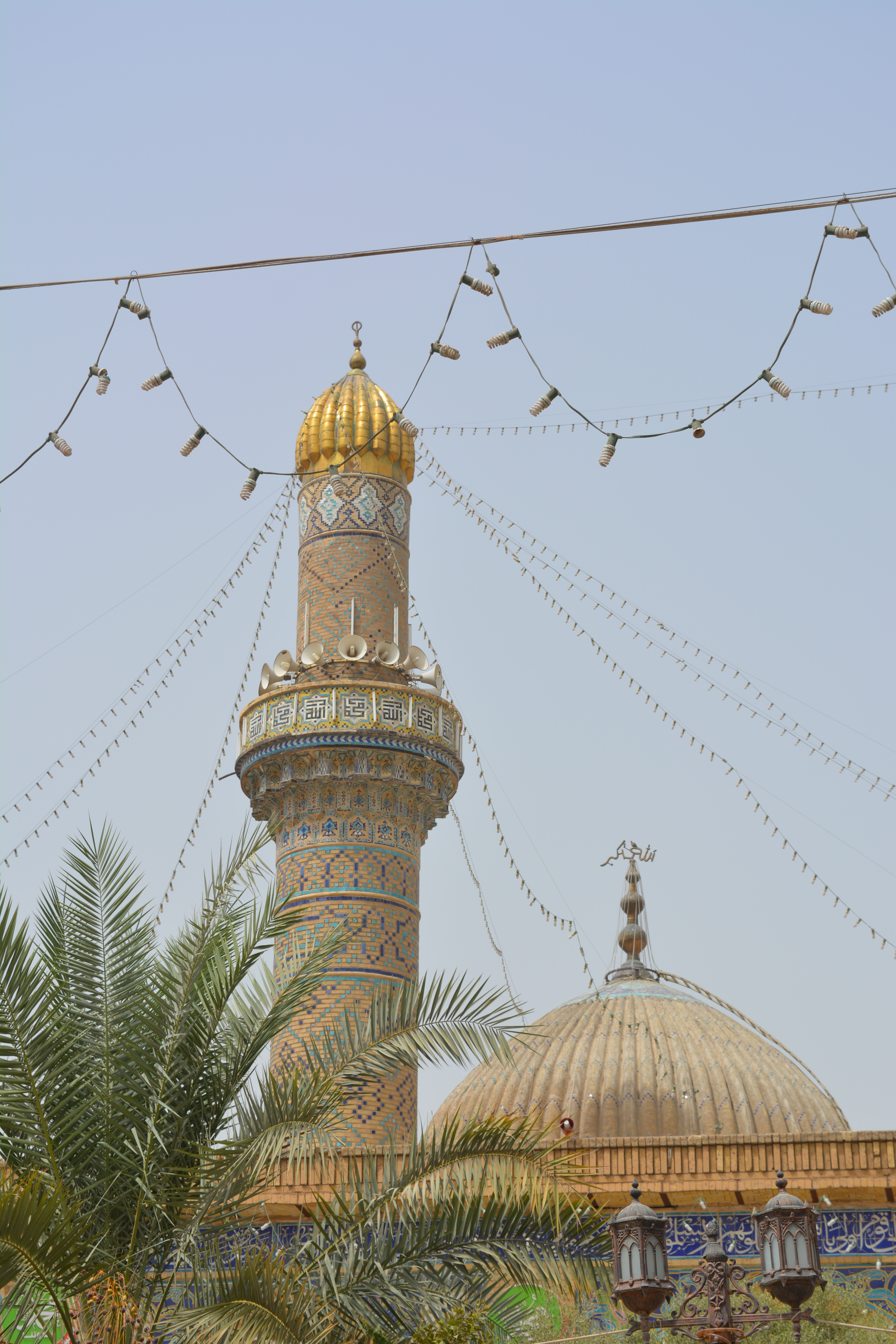 منارة جامع الامام ابو حنيفة النعمان و قبة مرقده